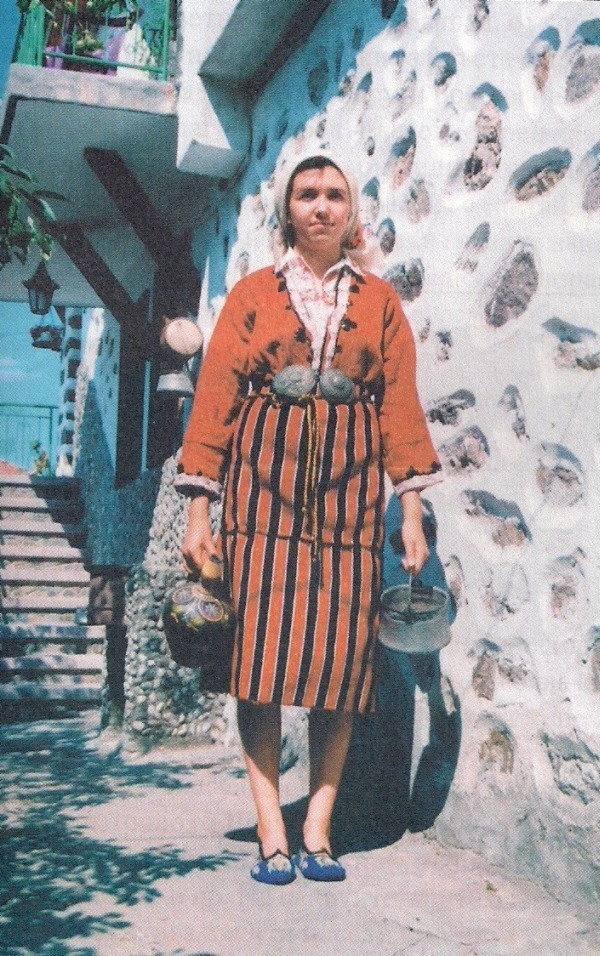 Женска носия от с. Селча